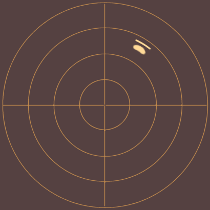 Antworttelegramm im Sekundärradarverfahren nach Mark X Standard